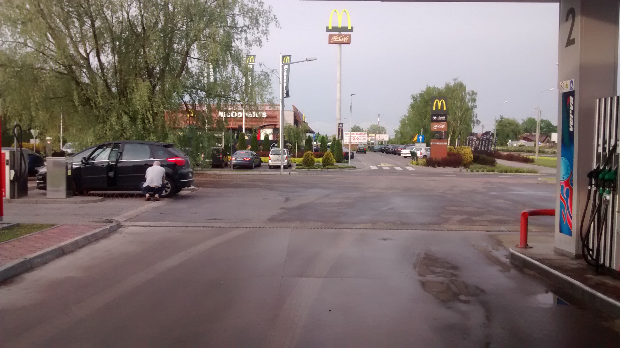 MC Donald's na osiedlu